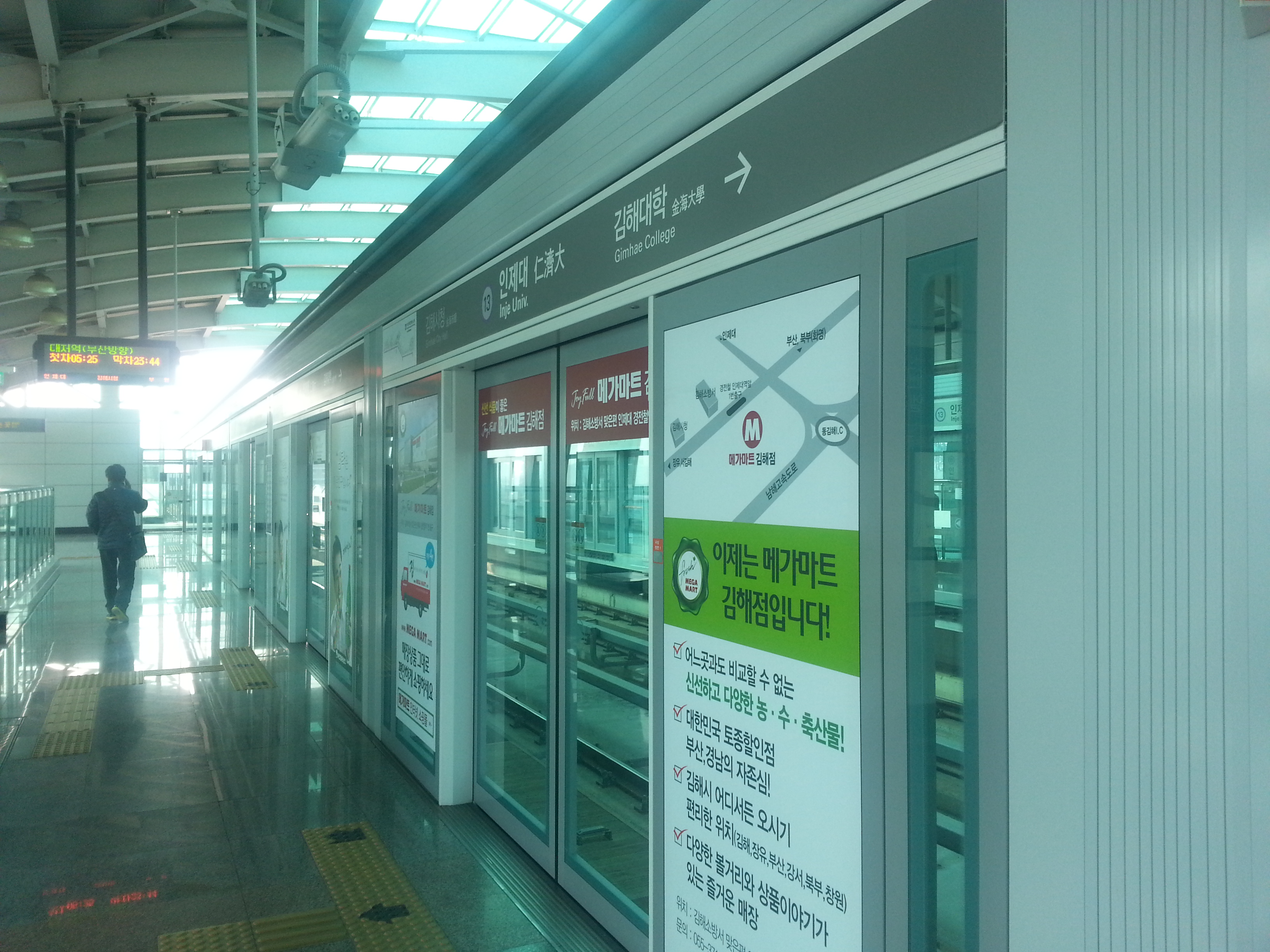 仁済大駅ホームドア。